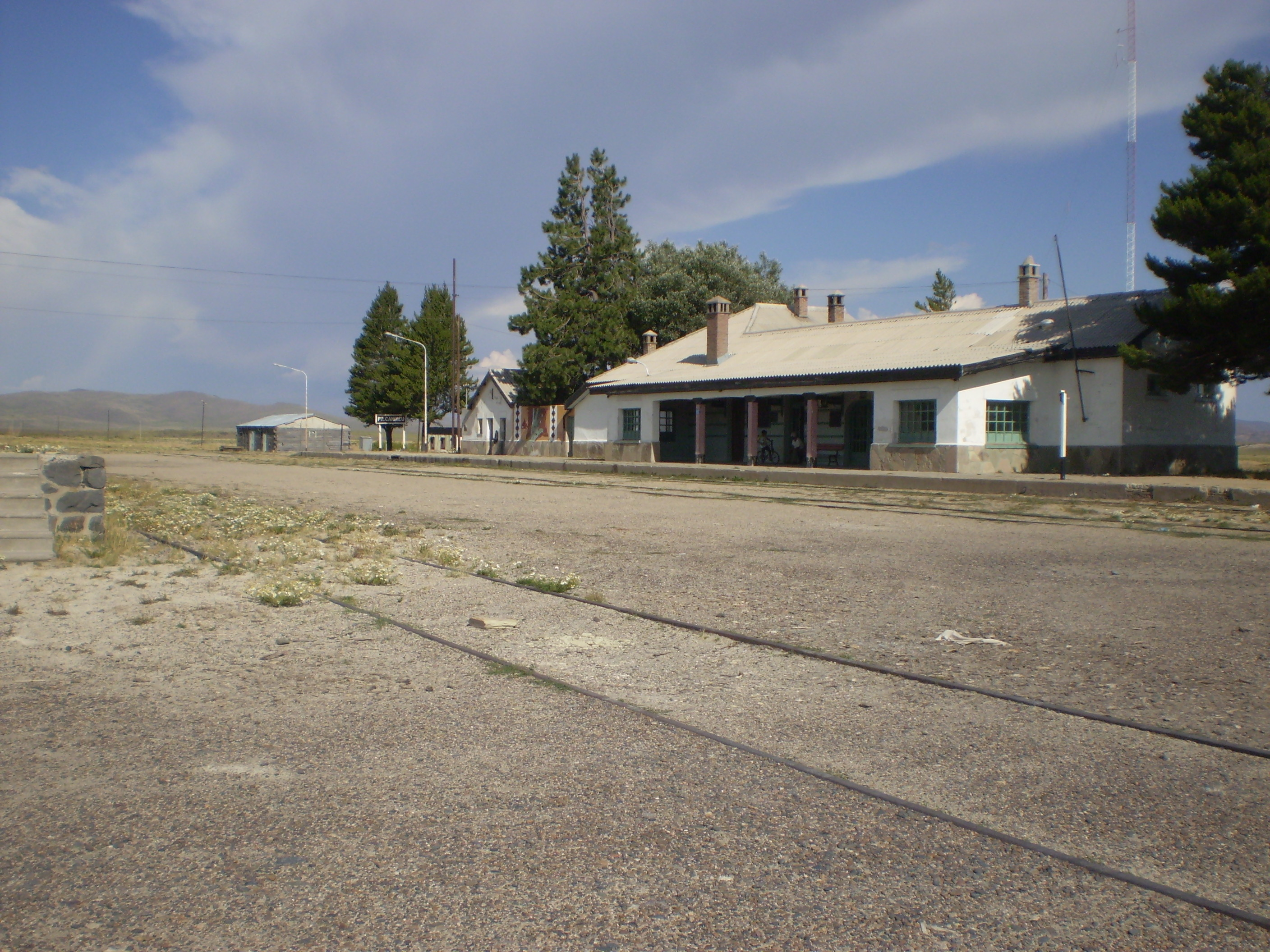 Estación del ferrocarril en Pilcaniyeu, Río Negro, Argentina.